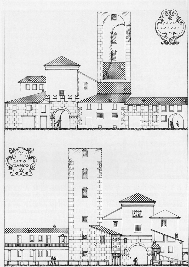 Milano, prospetto della Porta Romana medievale, con la rocchetta.